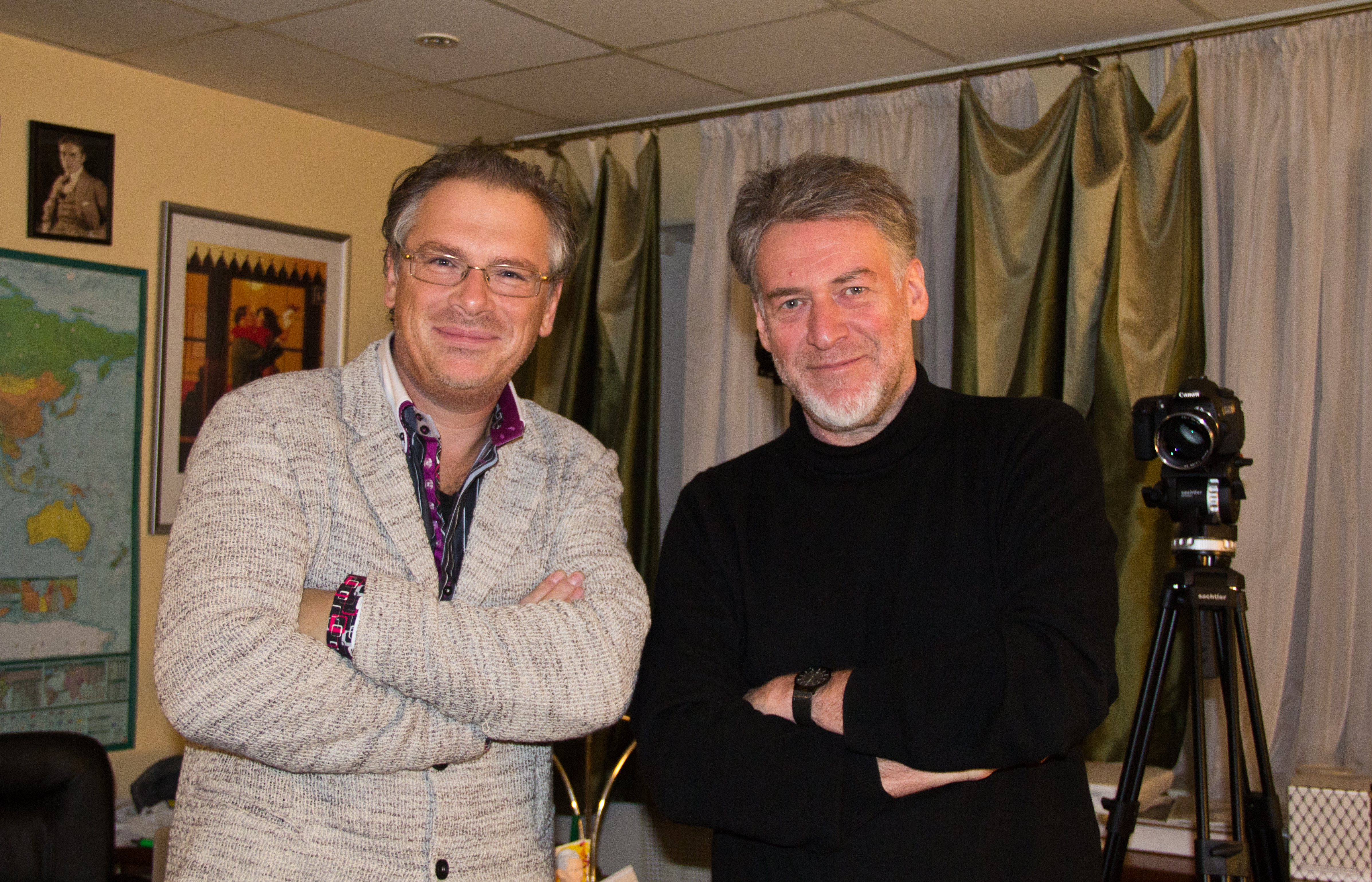 Алексей Лушников